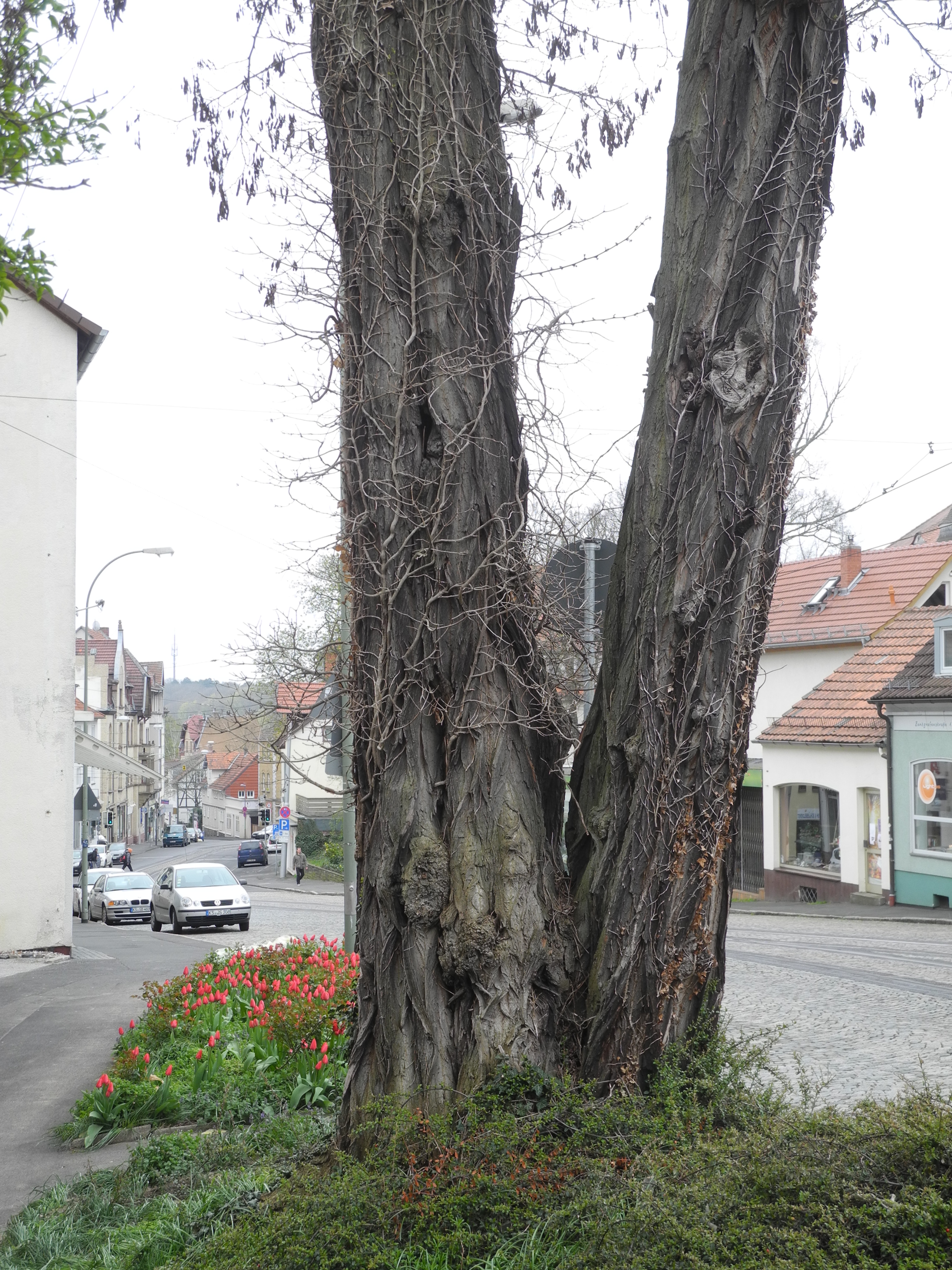 Naturdenkmal in Kassel 611.006. "Zweiergruppe Robinien" (Robinia pseudoacacia) - in Kirchditmold, Straßenrand Zentgrafenstraße, vor Haus Nr. 156.